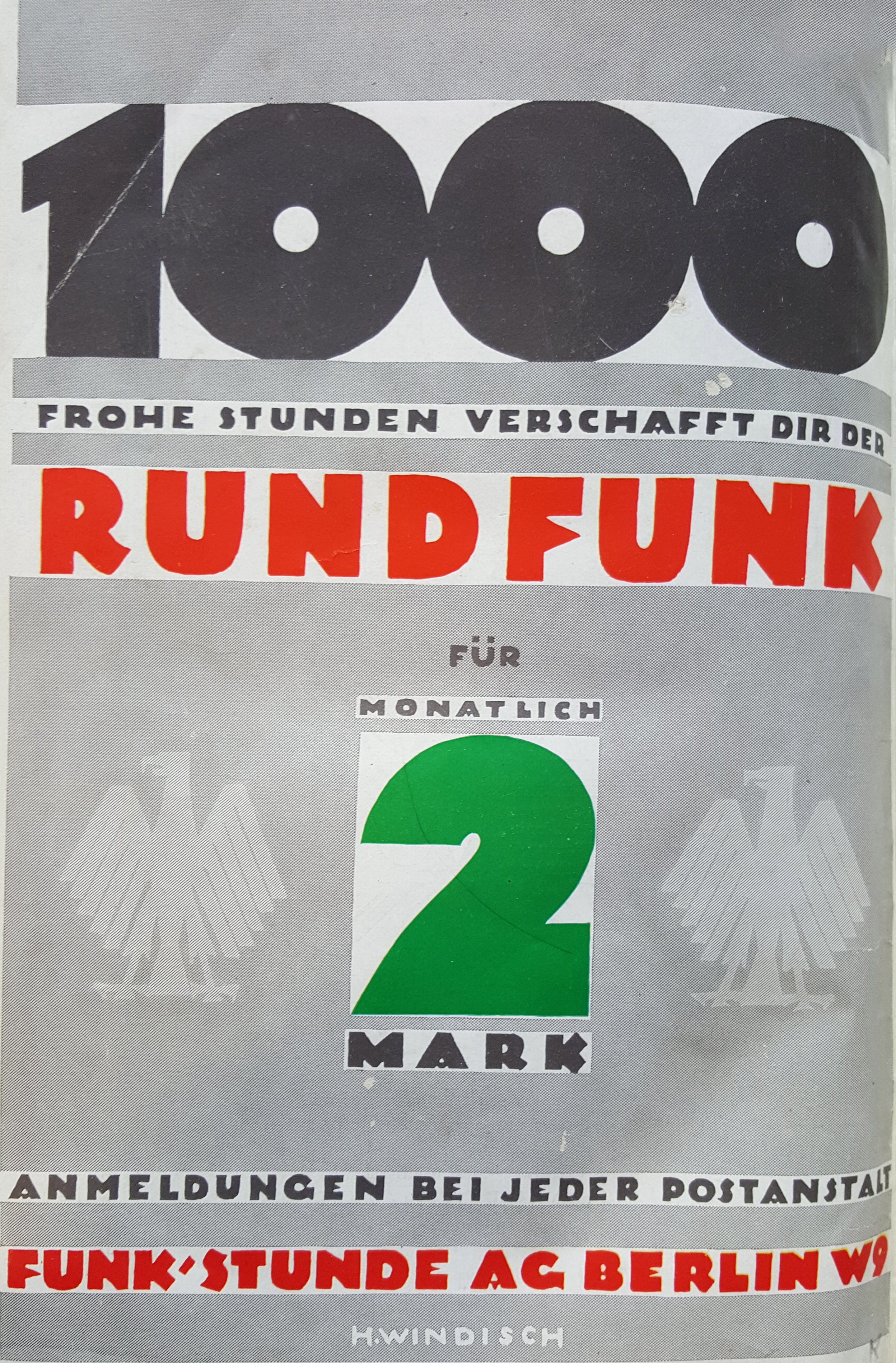 Werbung für die Rundfunkgebühr von 2 Reichsmark. Abgedruckt im Jahrbuch der Berliner Funk-Stunde 1926